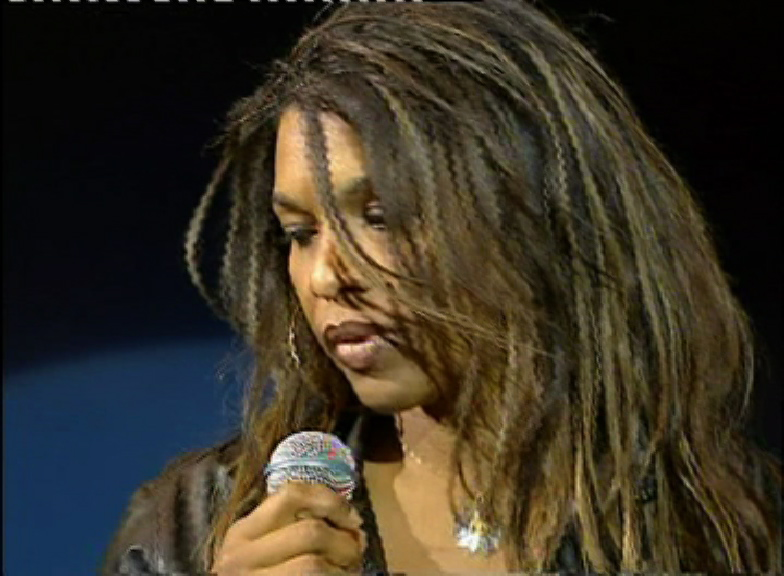 immagine di karin mensah del 1998 - opera propria